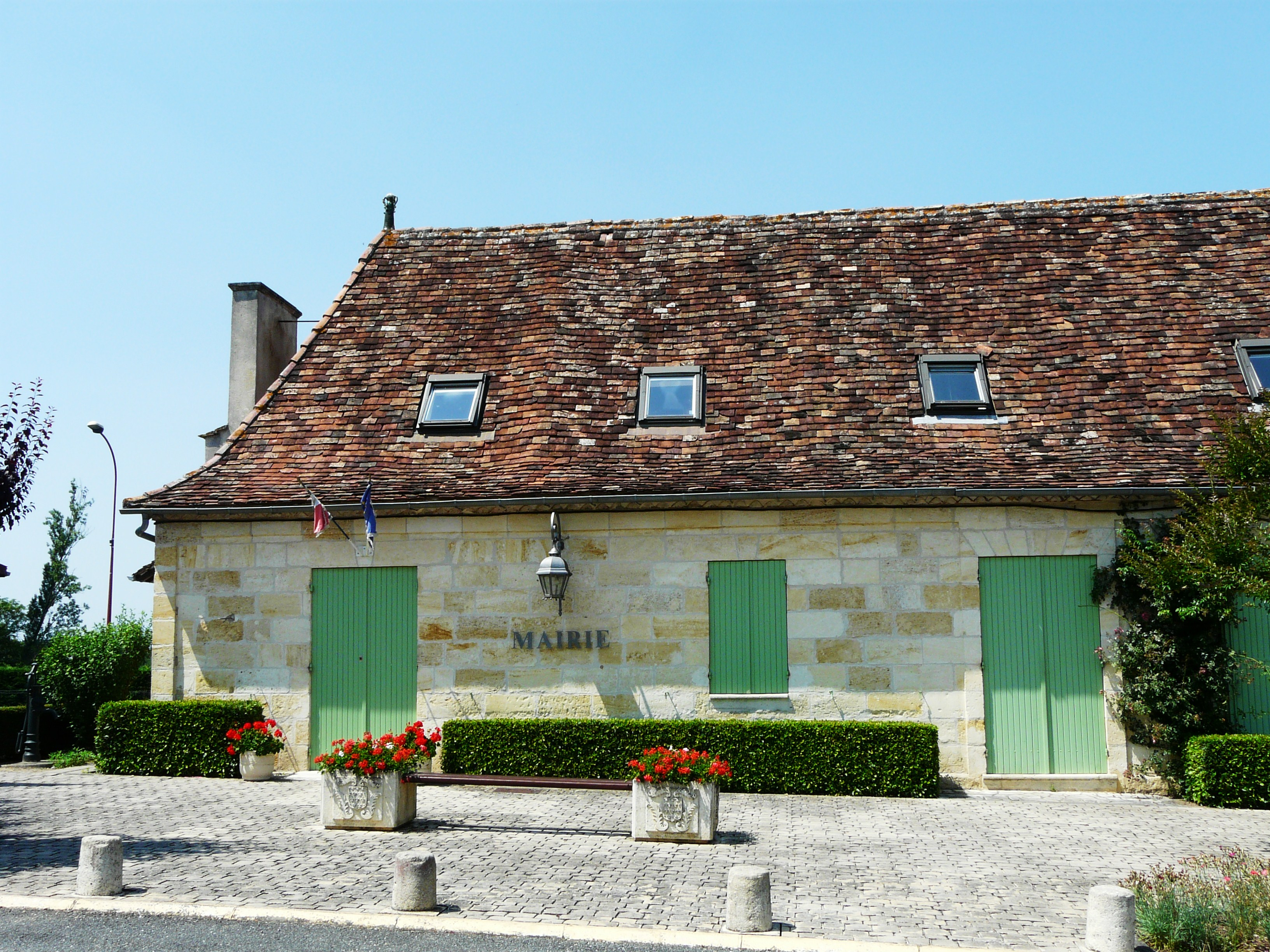 La mairie de Beaupouyet, Dordogne, France.